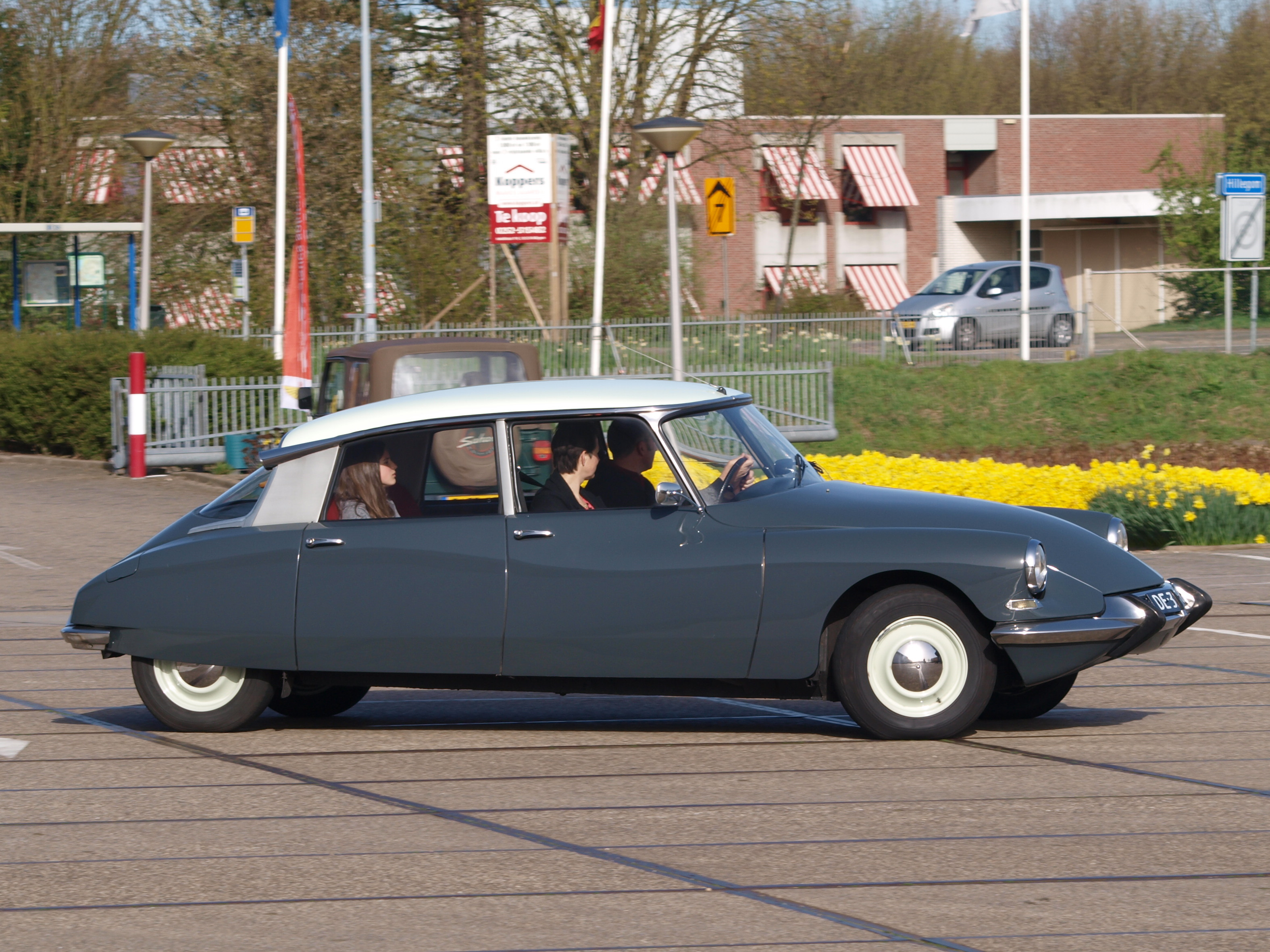 1967 Citroen ID19B